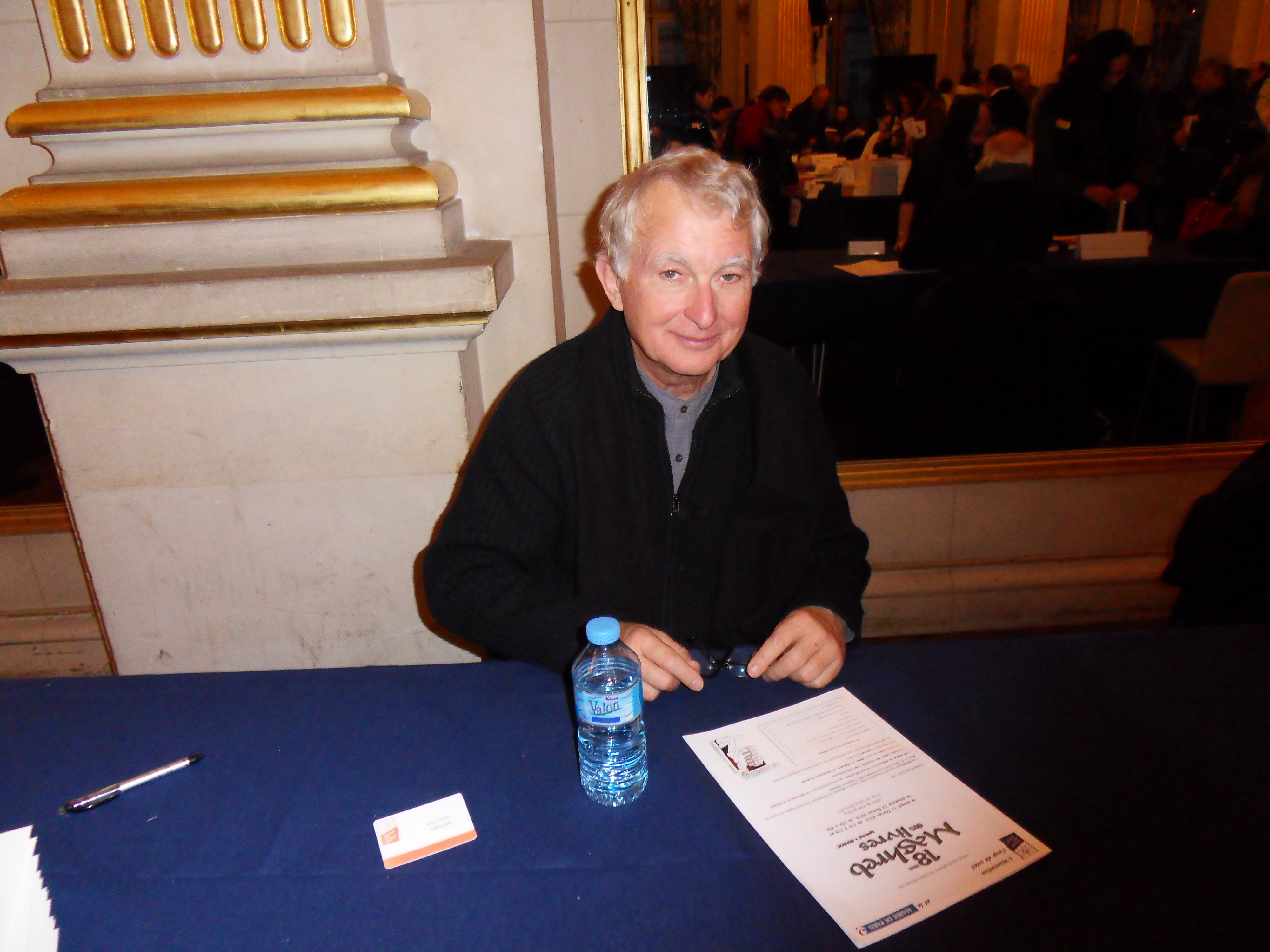 Maghreb des Livres, 11 février 2012 Jean-Claude Villain, Maghreb des Livres 2012